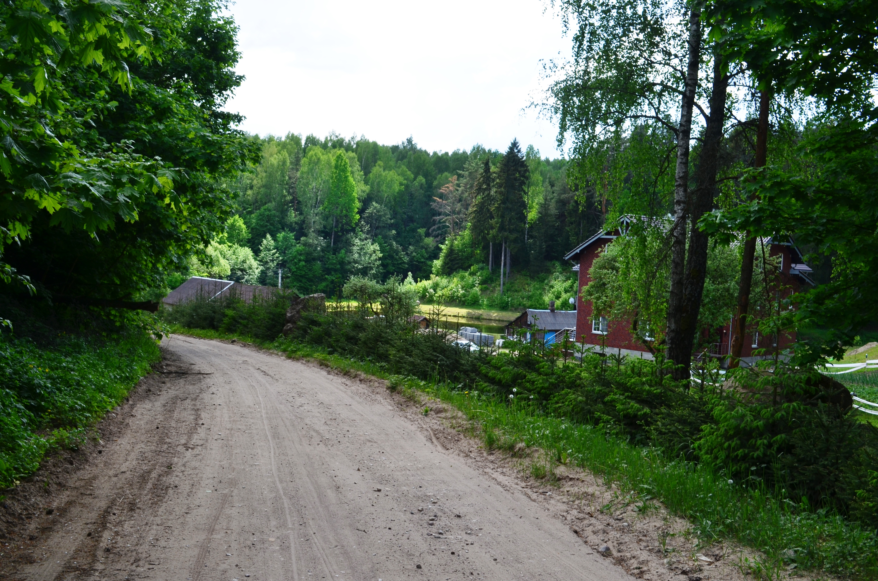 Grioviai, Vilniaus raj.